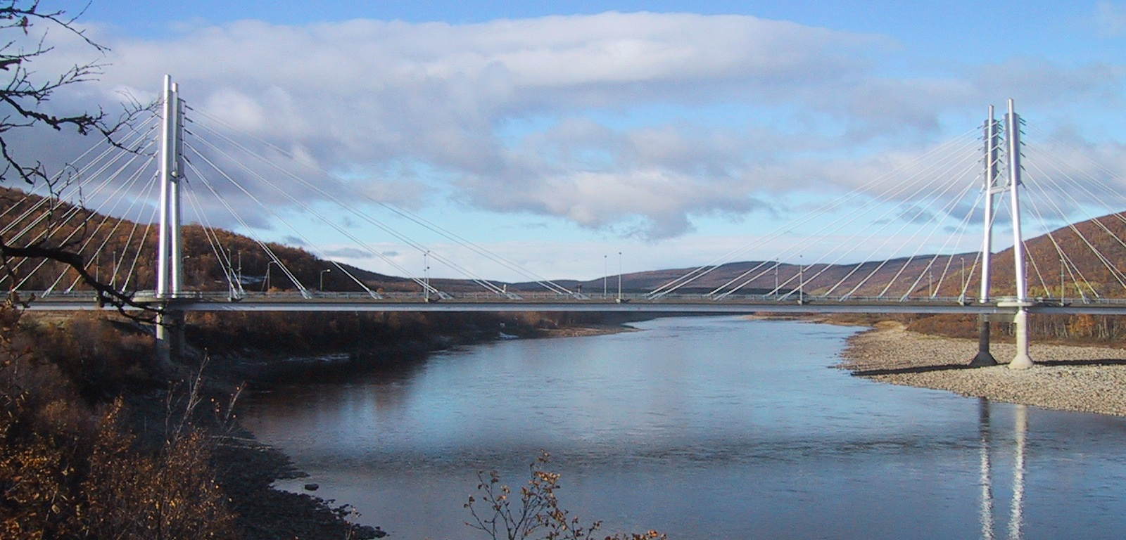 Samelandsbrua over Tanaelva